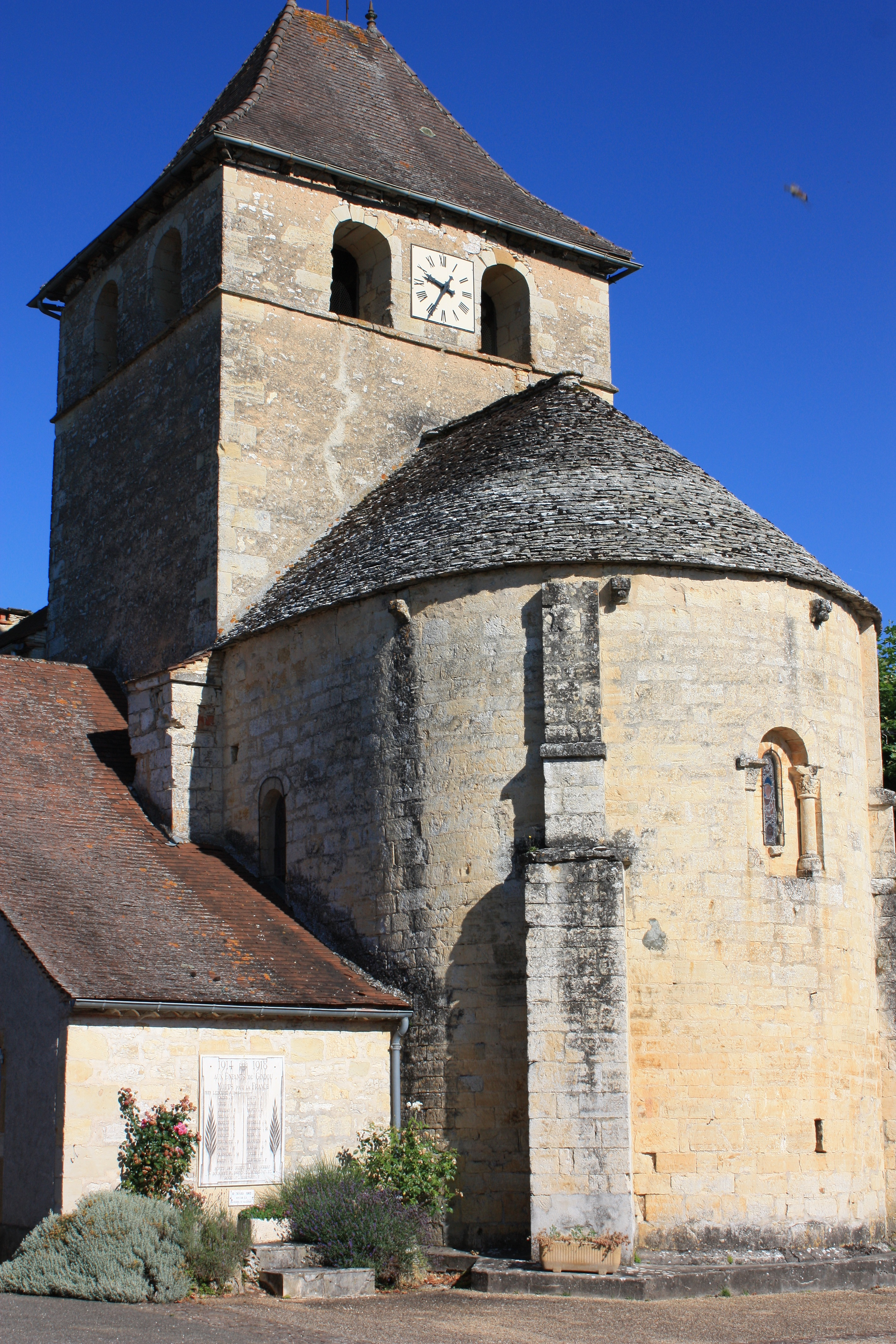 Gindou - Eglise Saint-Barthélemy